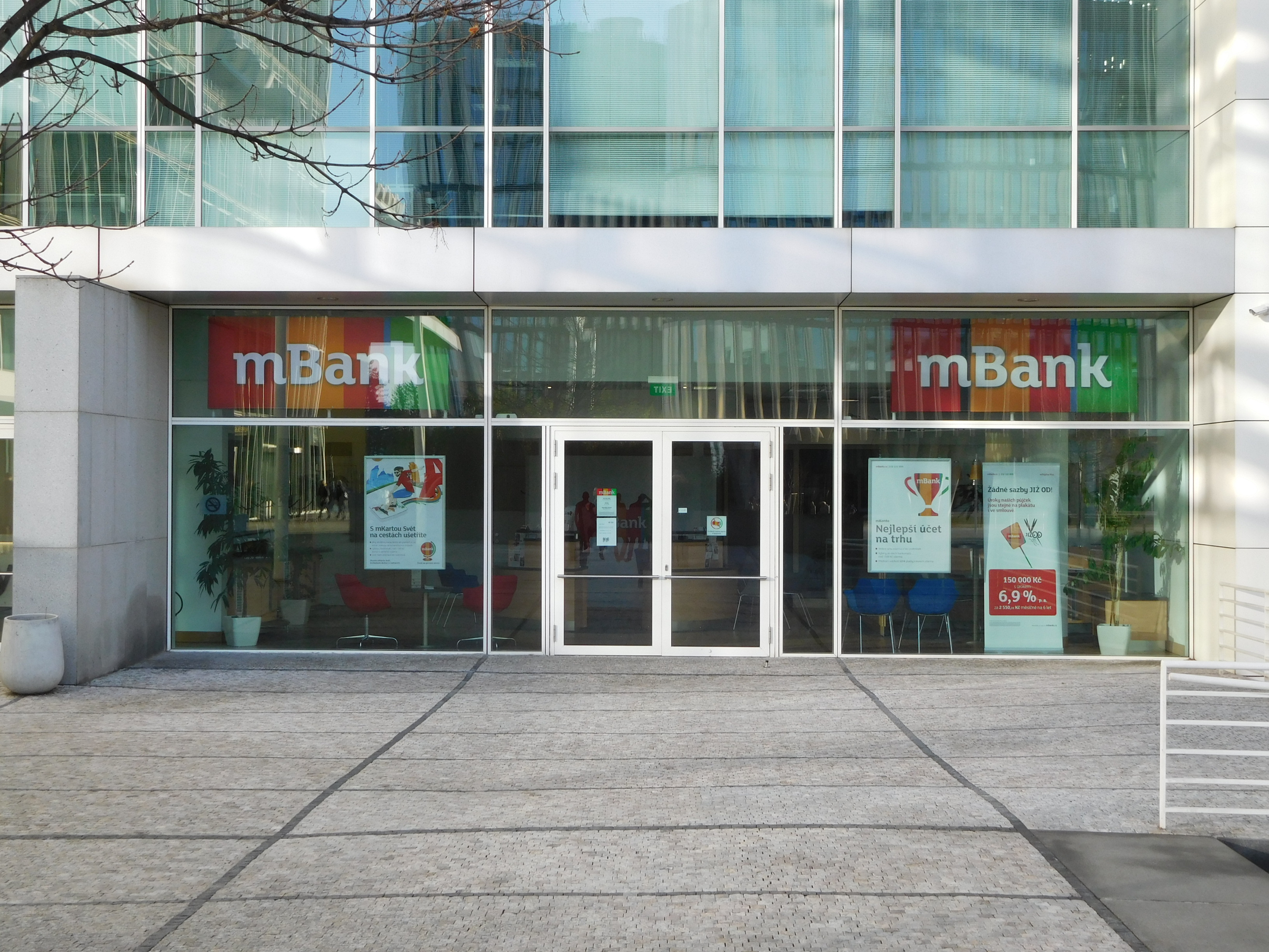 Praha - Pankrác, Hvězdova 2a, mBank